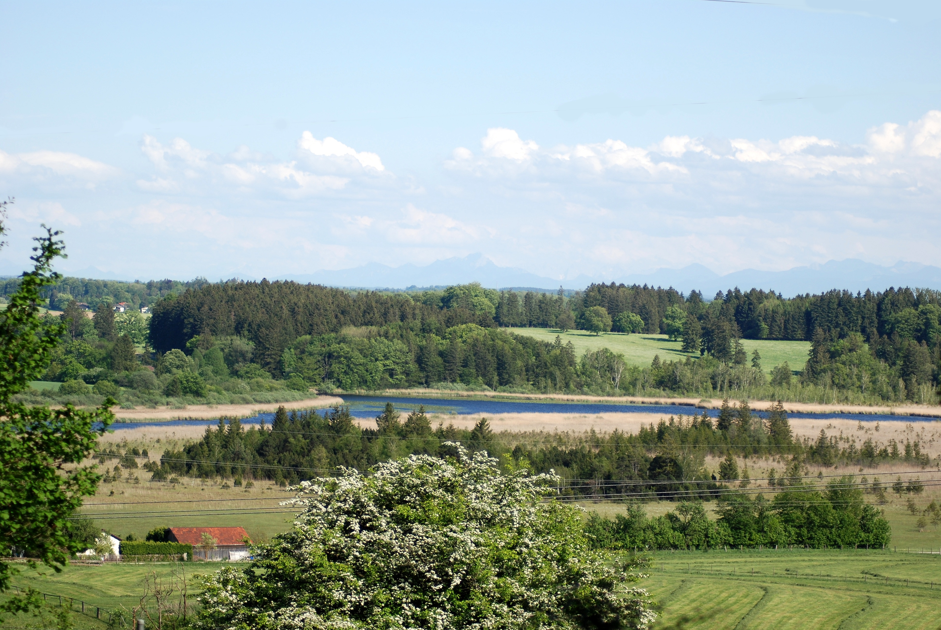 Pöcking, OT Maising, Naturschutzgebiet Maisinger See.